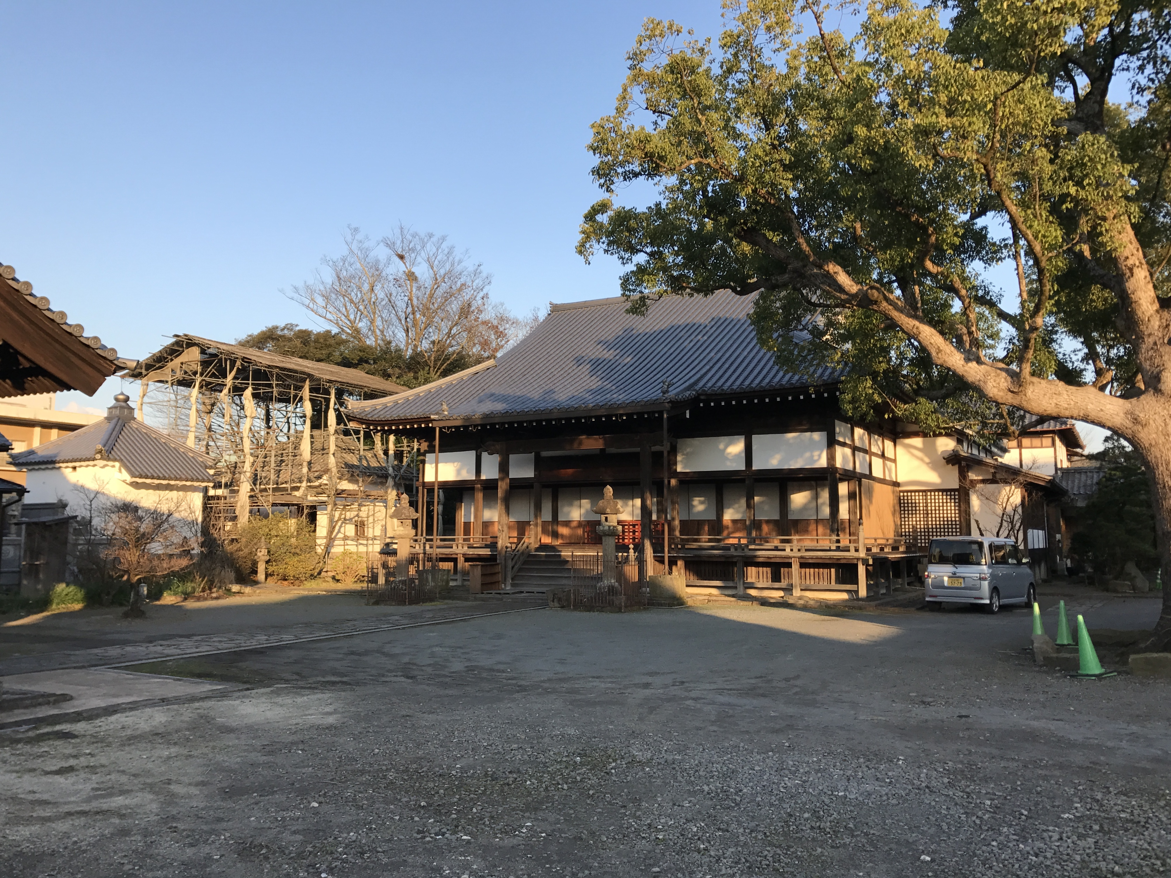 豆田町・長福寺の本堂